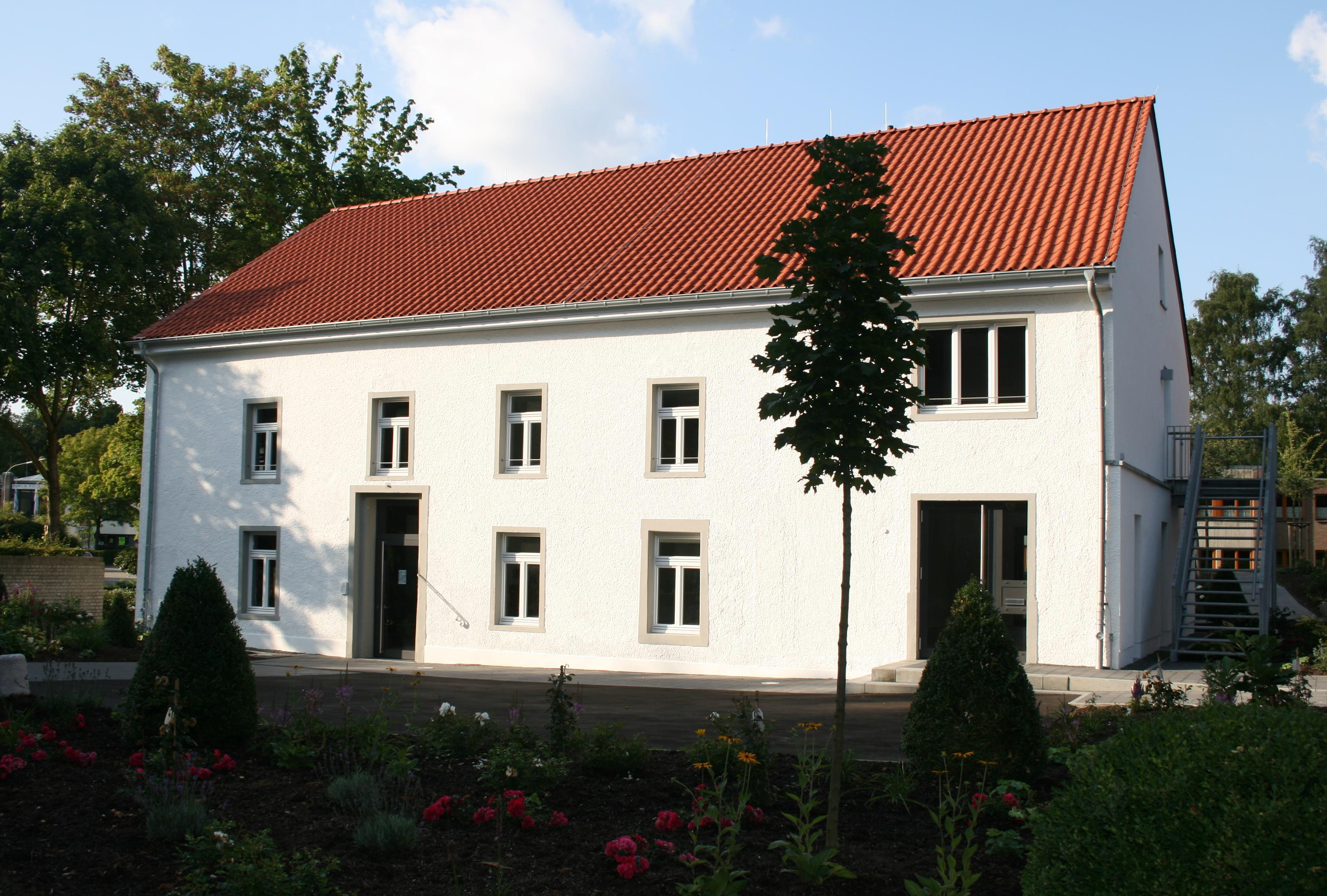 Das restaurierte Mühlengebäude der Wegberger Mühle